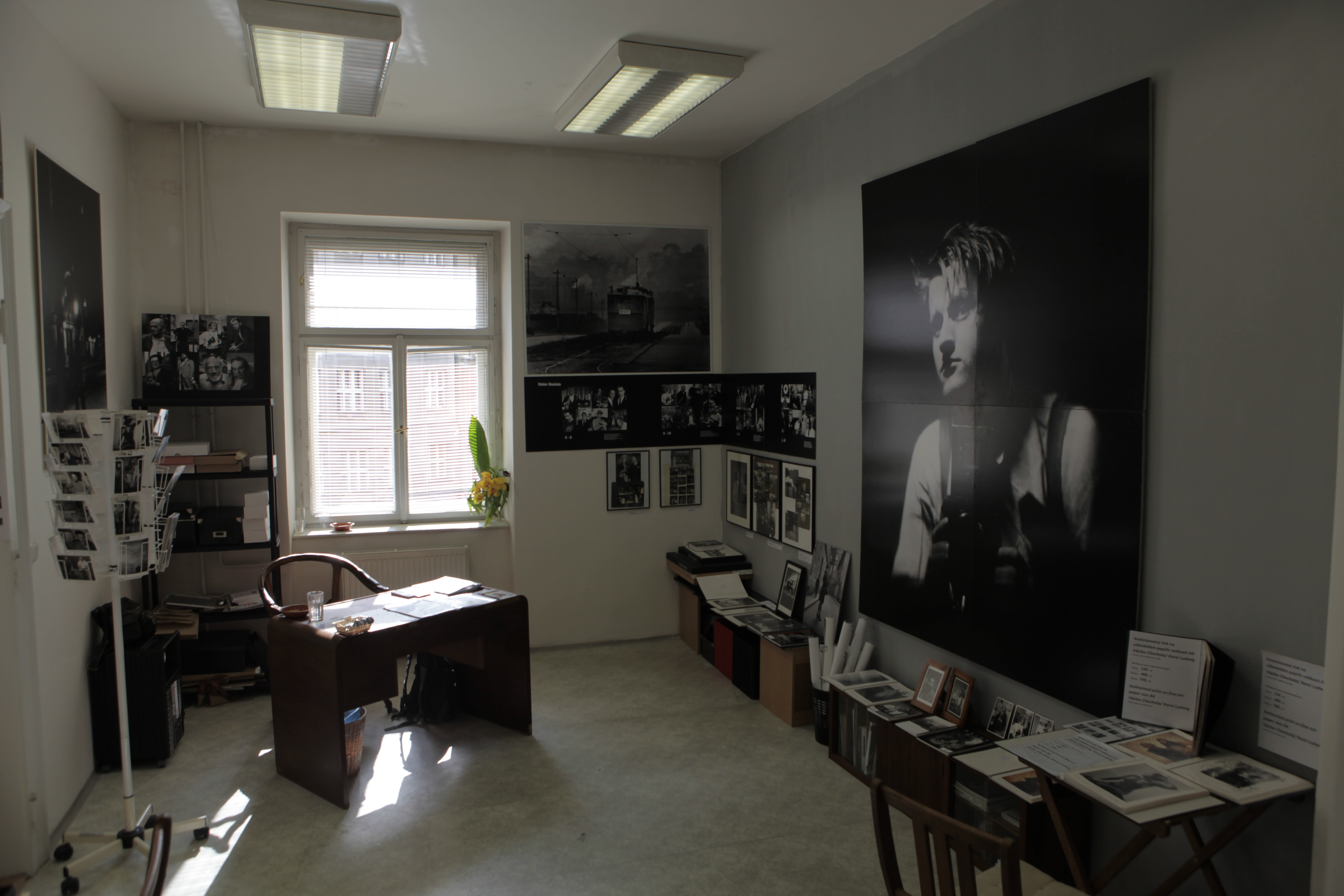 Expozice festivalu Prague Photo 2013, foto: Vít Švajcr Dobré světlo.com.